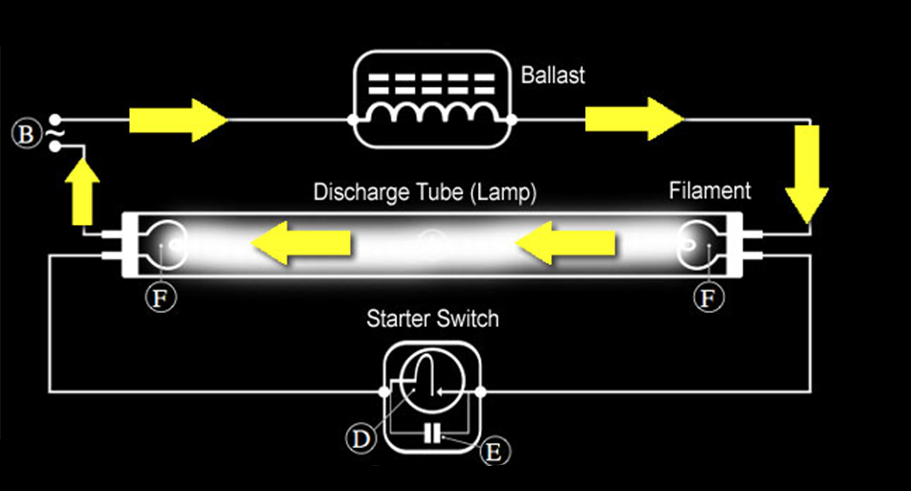 မြန်မာဘာသာ: မီးချောင်း မီးလင်းရန် ကြိုးစားအားထုတ်နေစဉ်